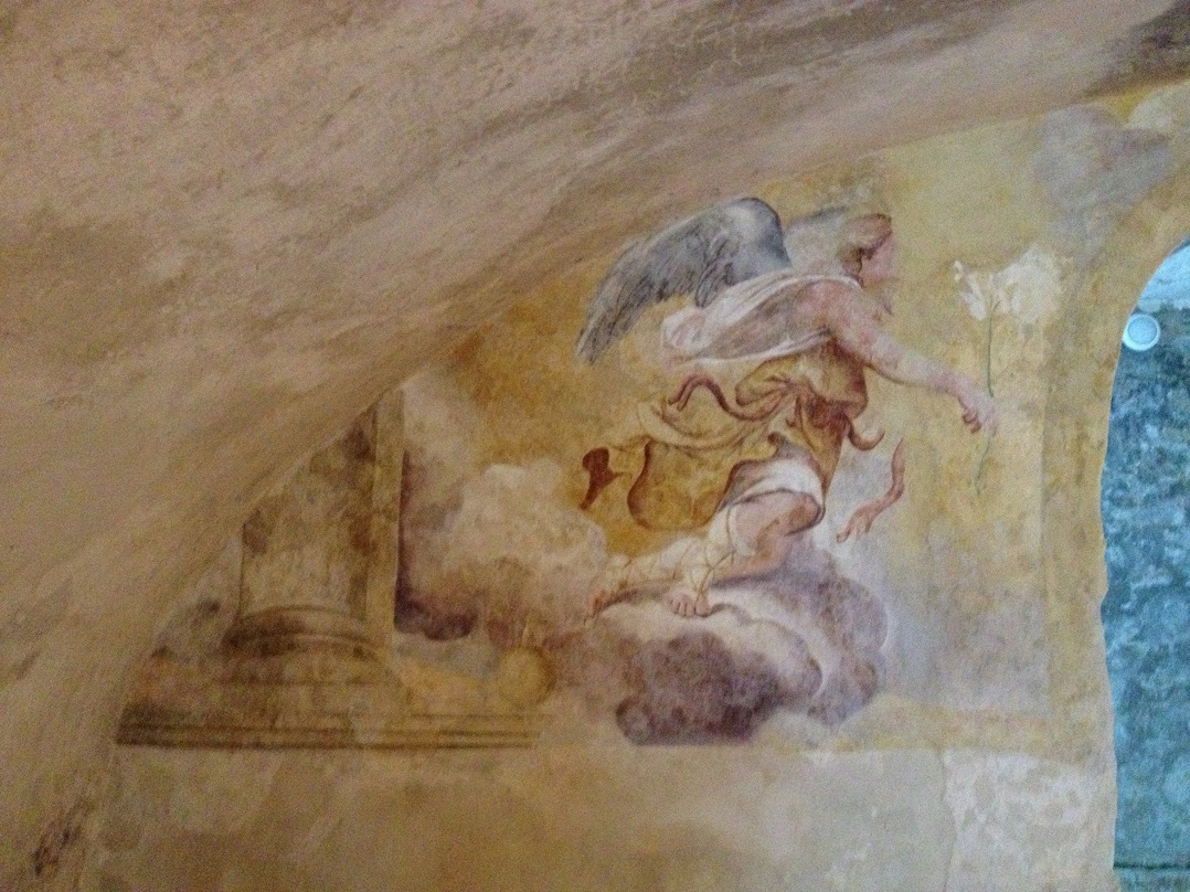 Affresco Annunciazione – Villa Manin Cantarella (Noventa Vicentina)